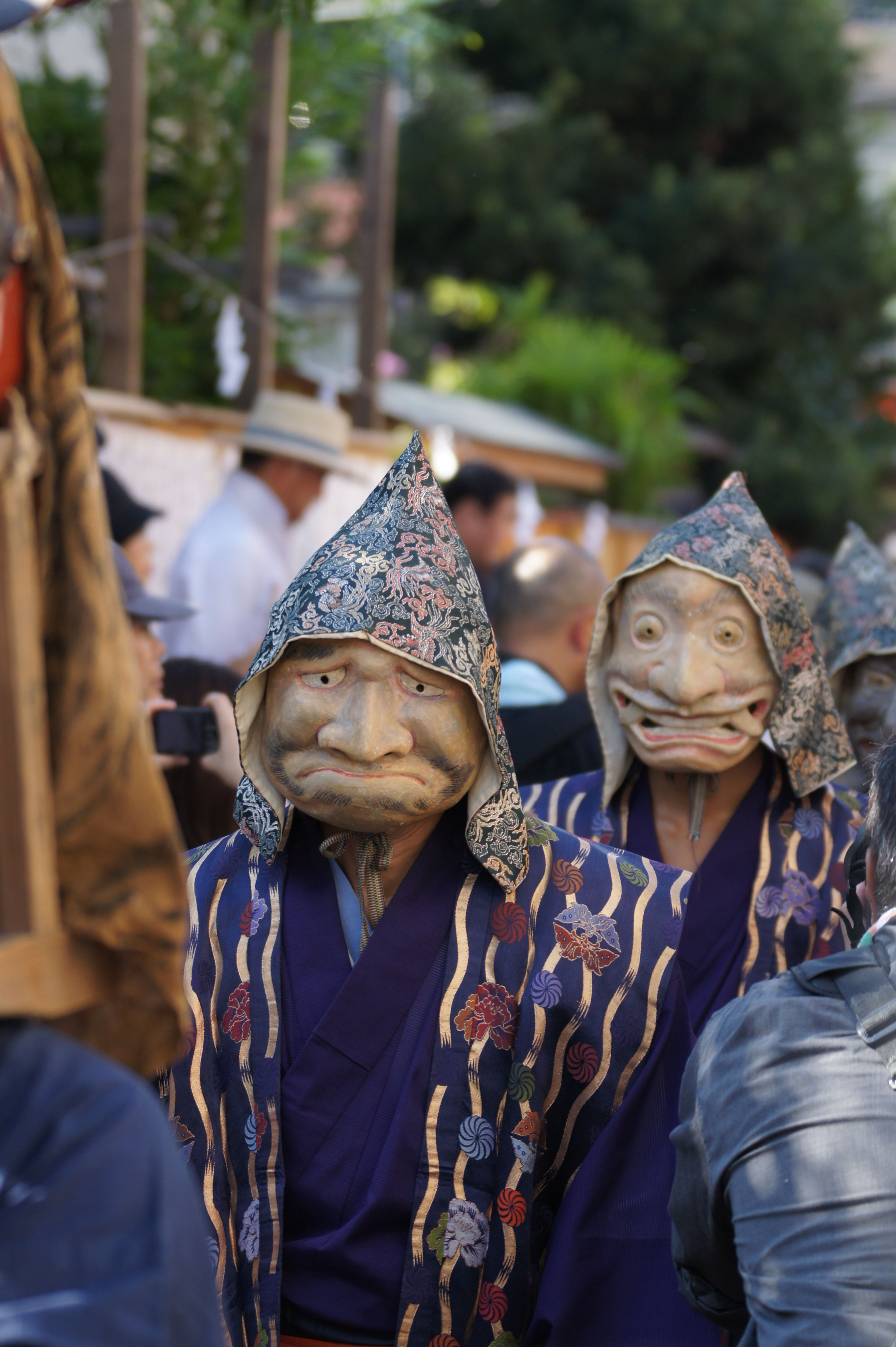 御霊神社 (鎌倉市)で行われるja:面掛行列の写真。（2010/09/18撮影）